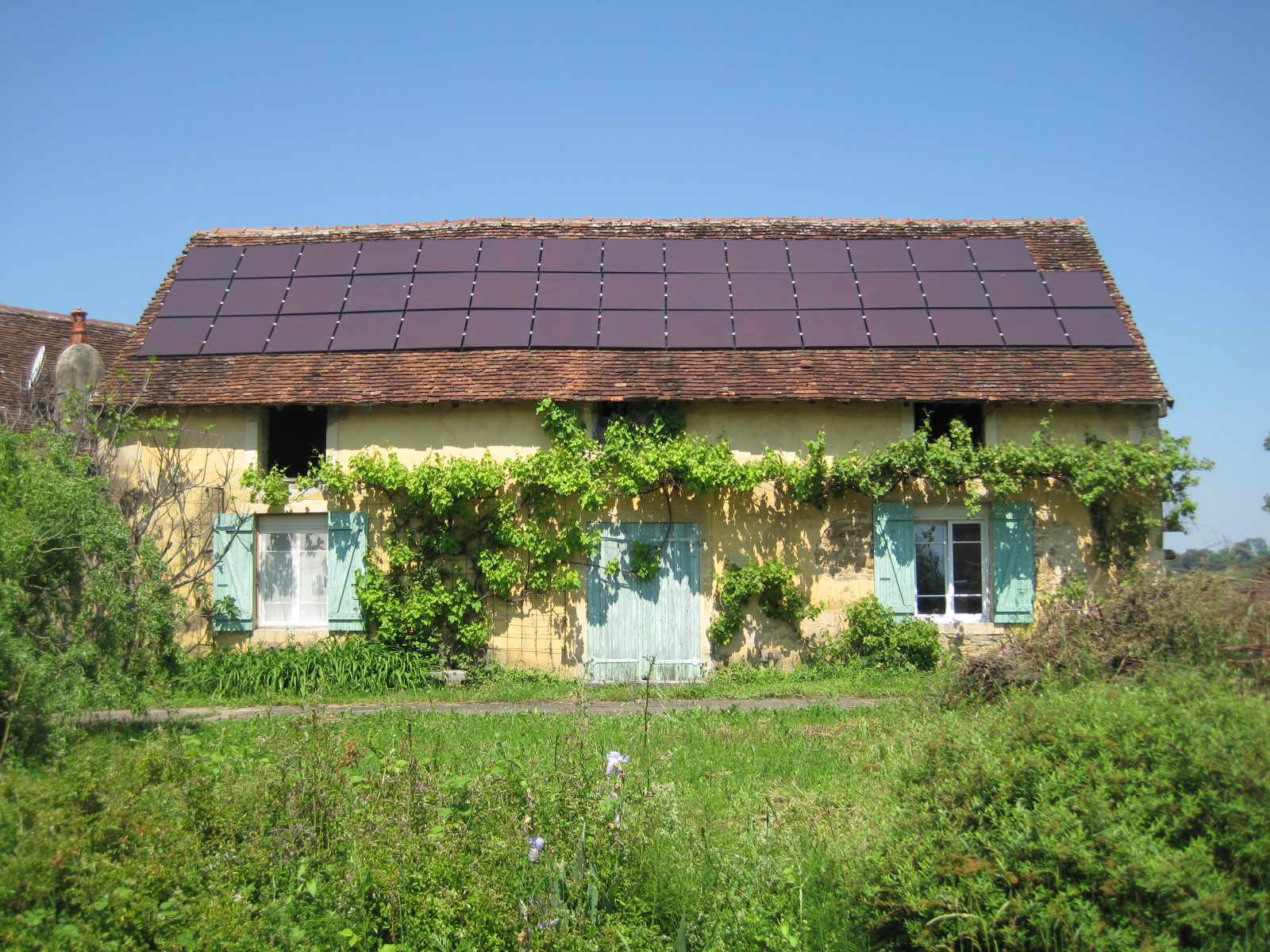 Habitation traditionnelle du Jura